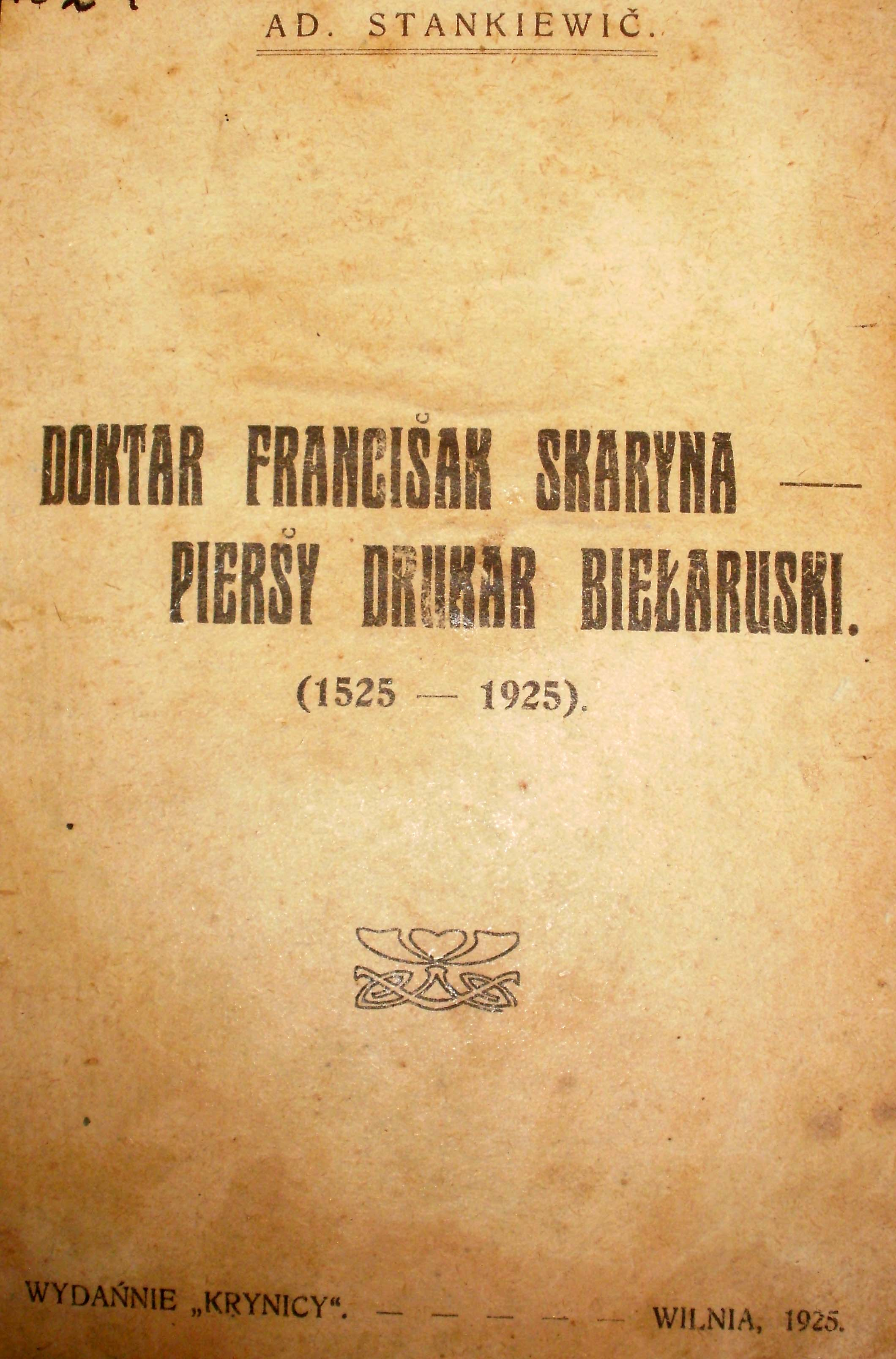 Беларуская (тарашкевіца): Адам Станкевіч. «Доктар Скарына — першы друкар беларускі». Вільня, 1925